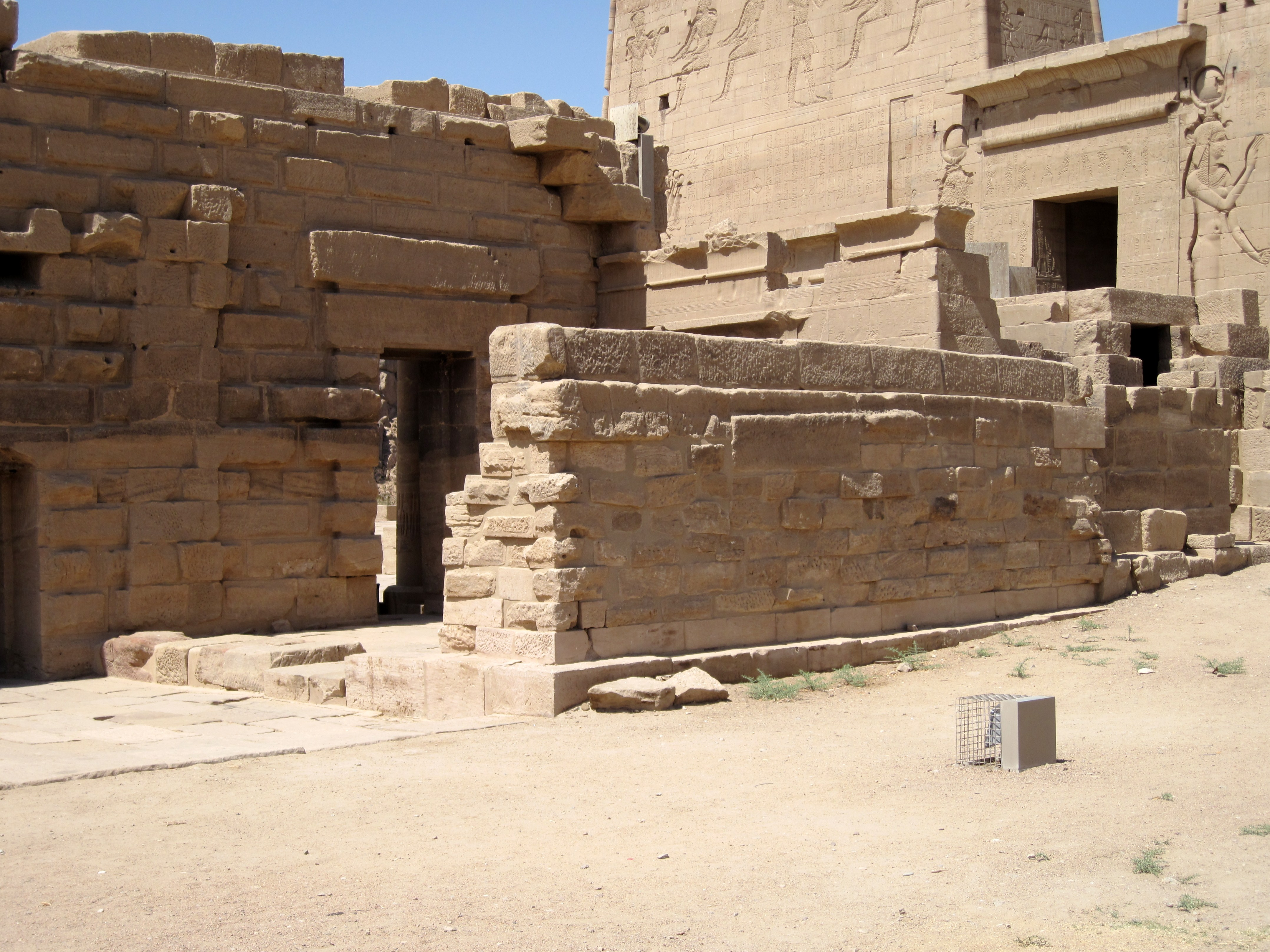 Tempel des Imhotep, angelegt in der Zeit des Pharao Ptolemaios II., vor dem ersten Pylon des Isis-Tempels von Philae auf der Insel Agilkia, Ägypten